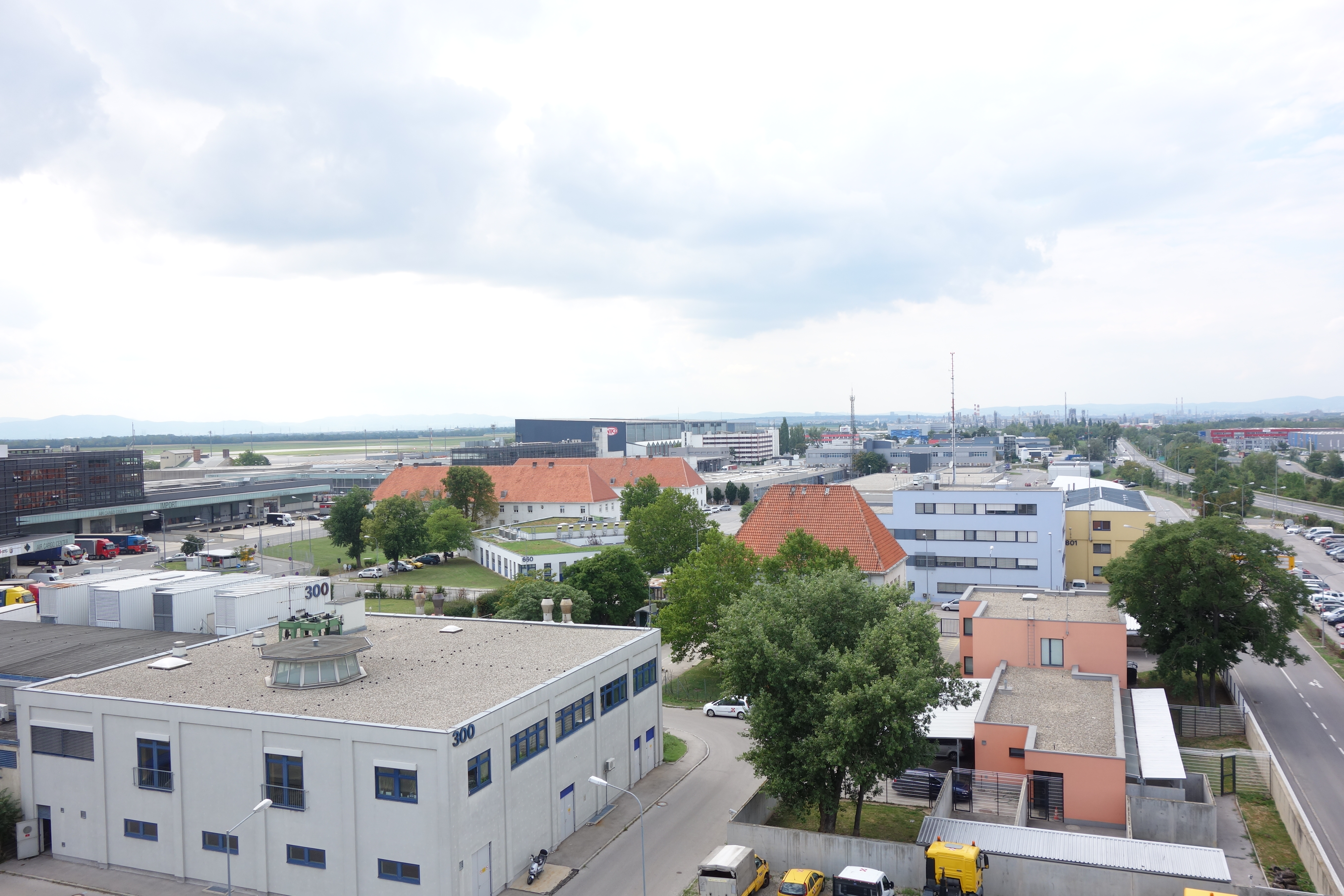 Das Betriebsgelände am Flughafen Wien im Juli 2014. Die Aufnahme entstand vom Parkhaus 8.